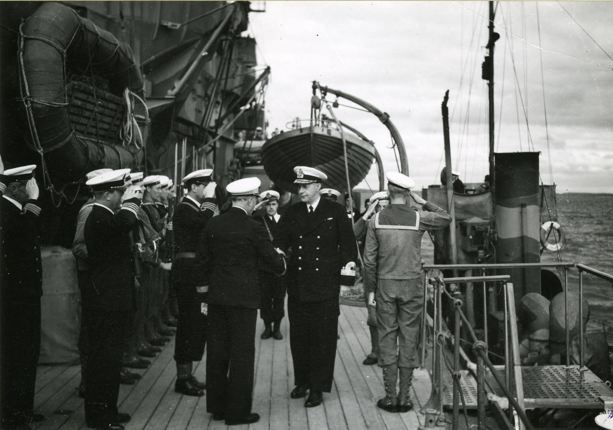 Chefen för Marinen, viceamiral Fabian Tamm (1879-1955), inspekterar pansarskeppet HMS Sverige. Marinchefen hälsar på Chefen för Kustflottan, konteramiral Yngve Ekstrand (1888-1951), som har ryggen mot kameran.